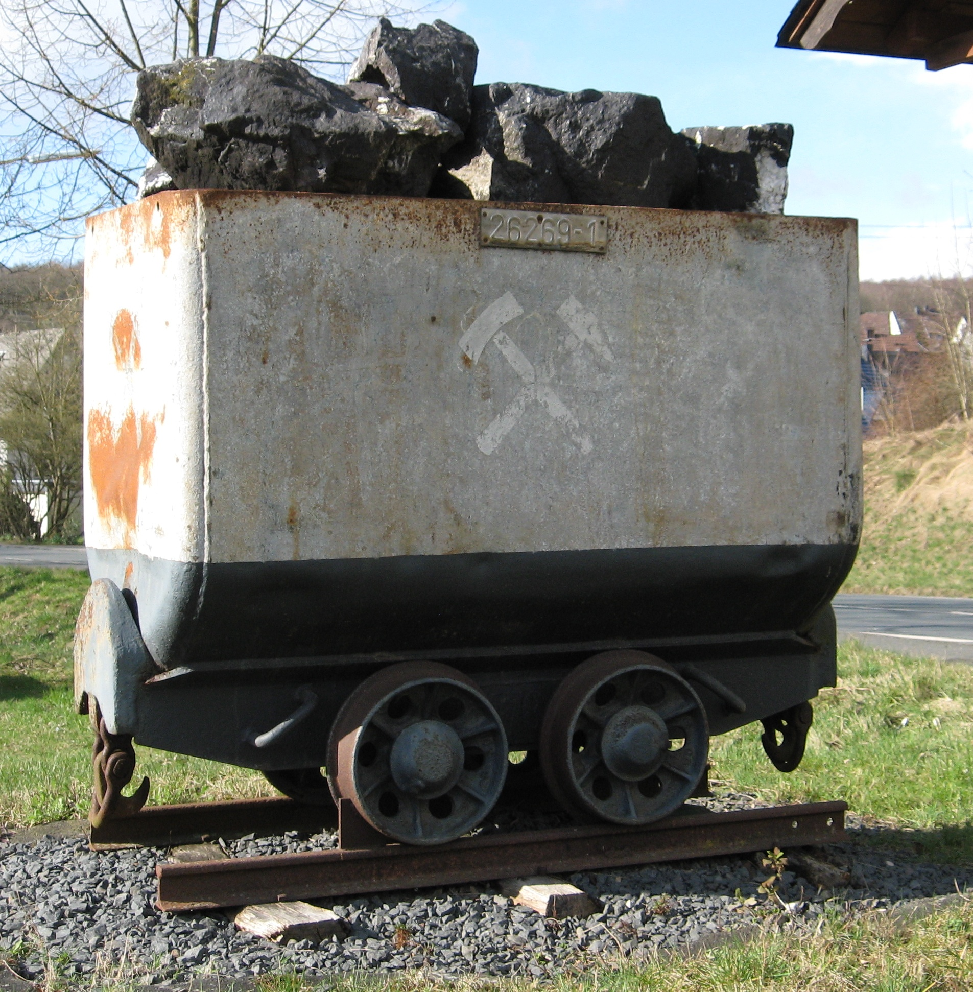 Bergbaudenkmal in Salchendorf / mining memorial in Salchendorf